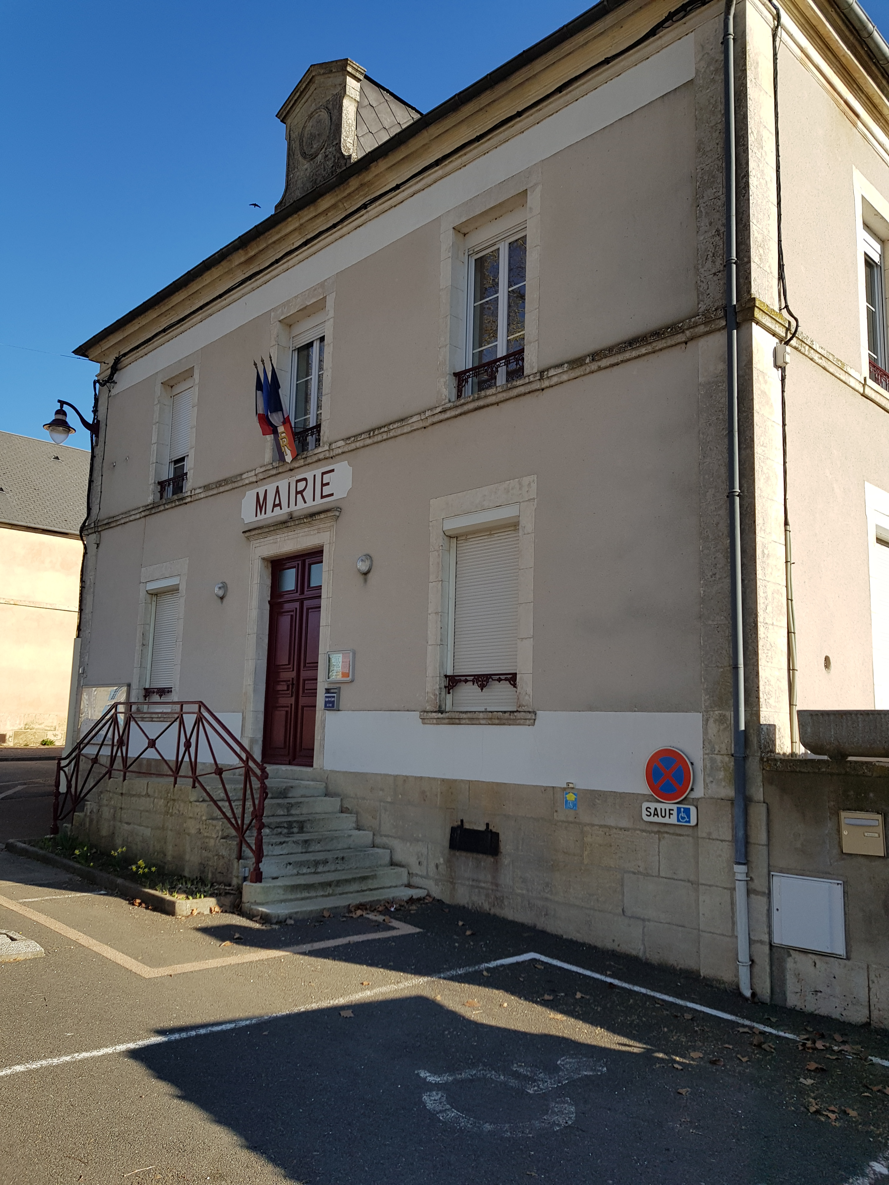 Mairie de Mesves-sur-Loire (58).